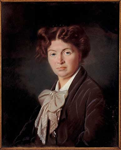 Nadine Dumas, nee Knorring